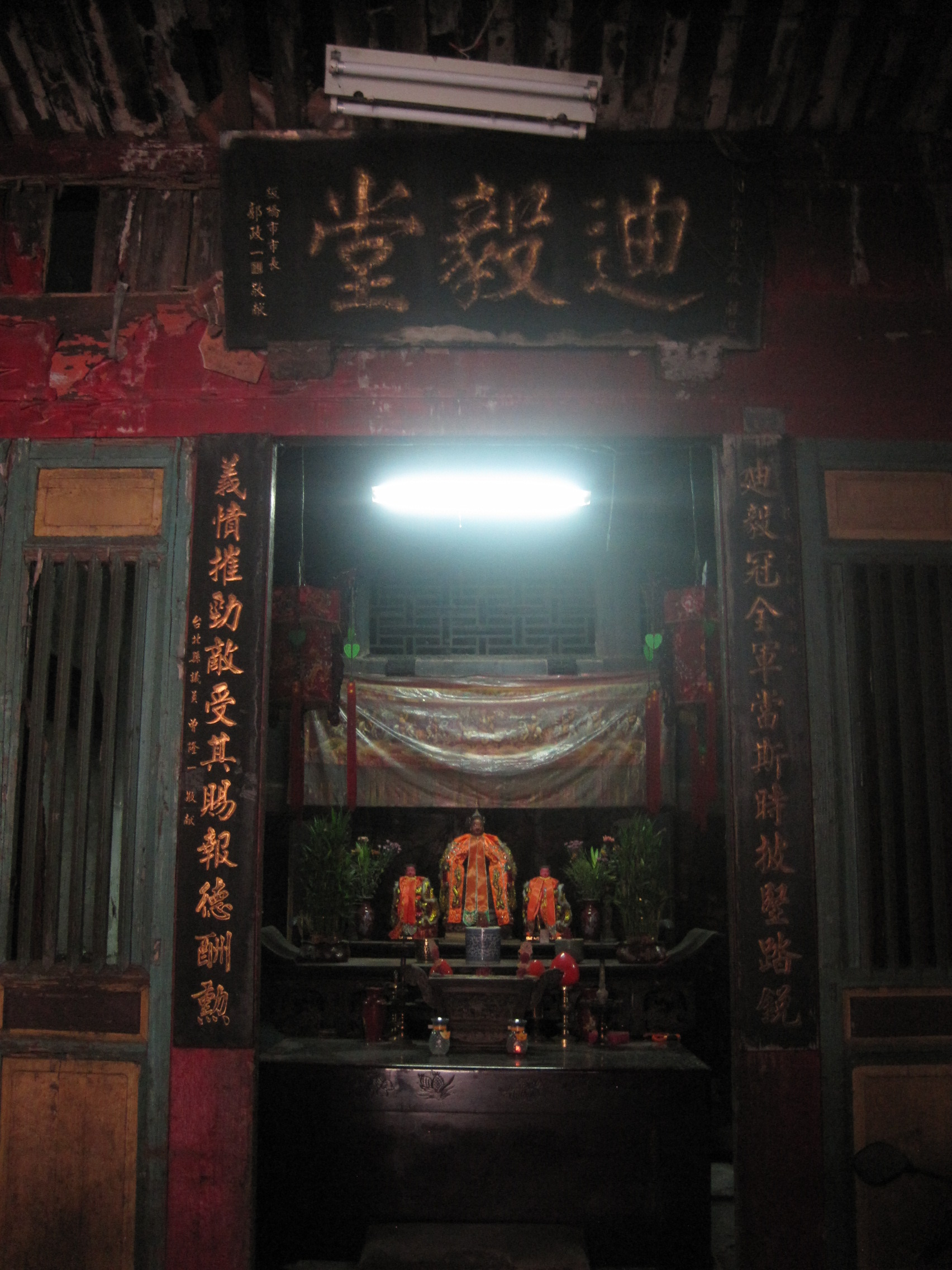 板橋迪毅堂